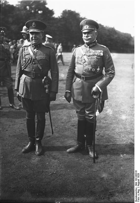 Der Generalinspekteur des argentinischen Heeres, General Toranzo besichtigt das Berliner Wacht-Regiment! Der Generalinspekteur des argentinischen Heeres General Toranzo (links) und der Chef der deutschen Heeresleitung General Heye (rechts) vor der Parade des Berliner Wacht-Regiments.